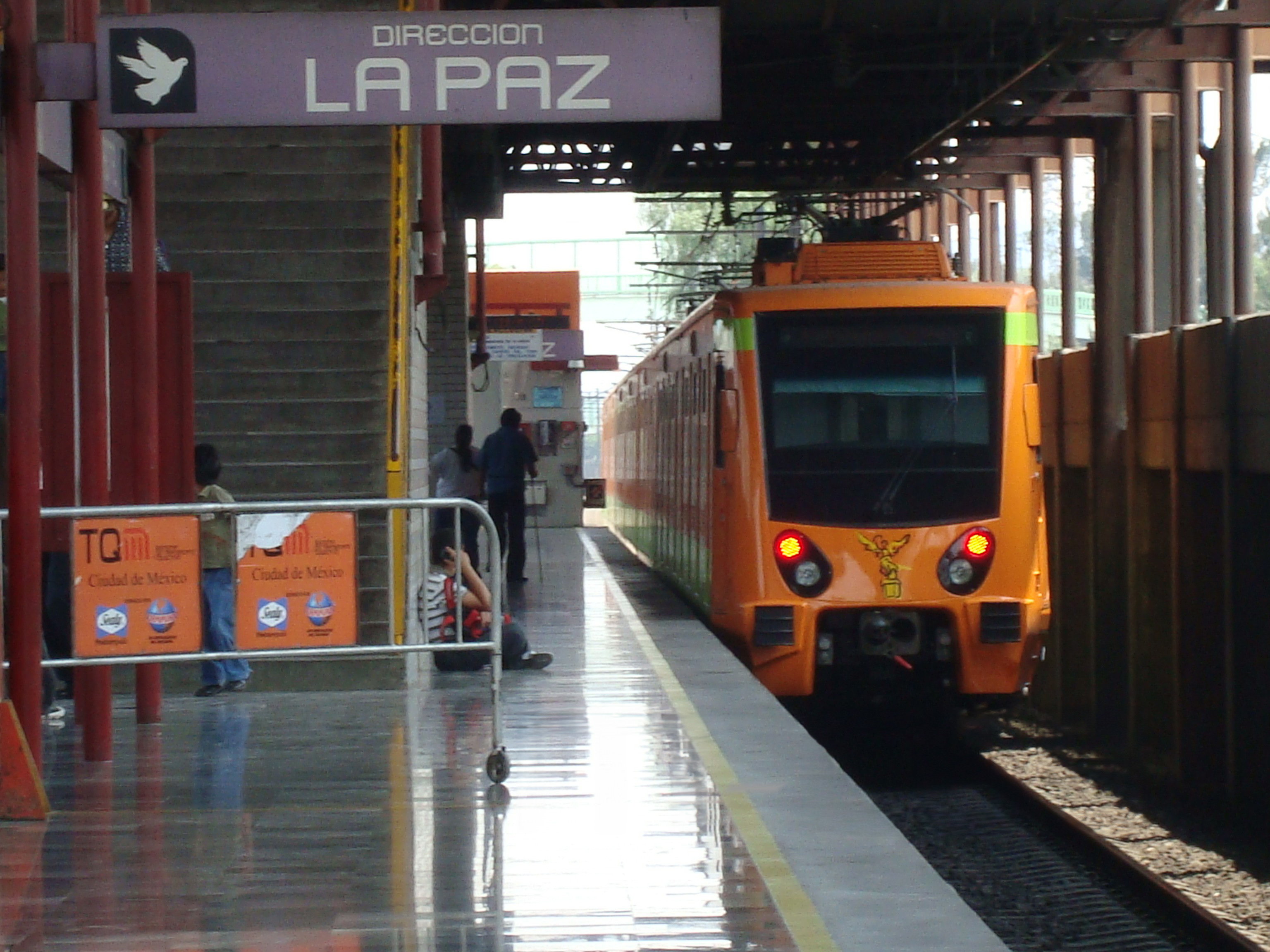 Esta es una foto de el nuevo tren que recibio la ciudad de Mexico para el parque vehicular de la linea A del Metro. El Modelo es un FE-07 (Ferreo Español 2007) originario de españa por la compañia CAF. Lamento haber colocado creditos en la foto pero es por razones de seguridad de la foto.